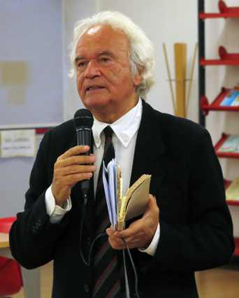 Duccio Demetrio